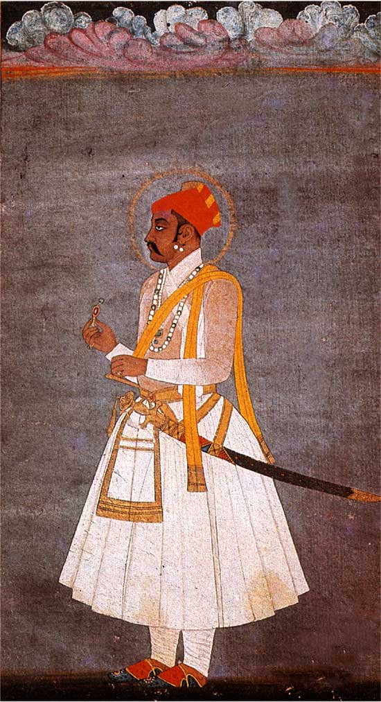 painting Maharaja Sawai Jai Singh II (November 3, 1688-September 21, 1743)